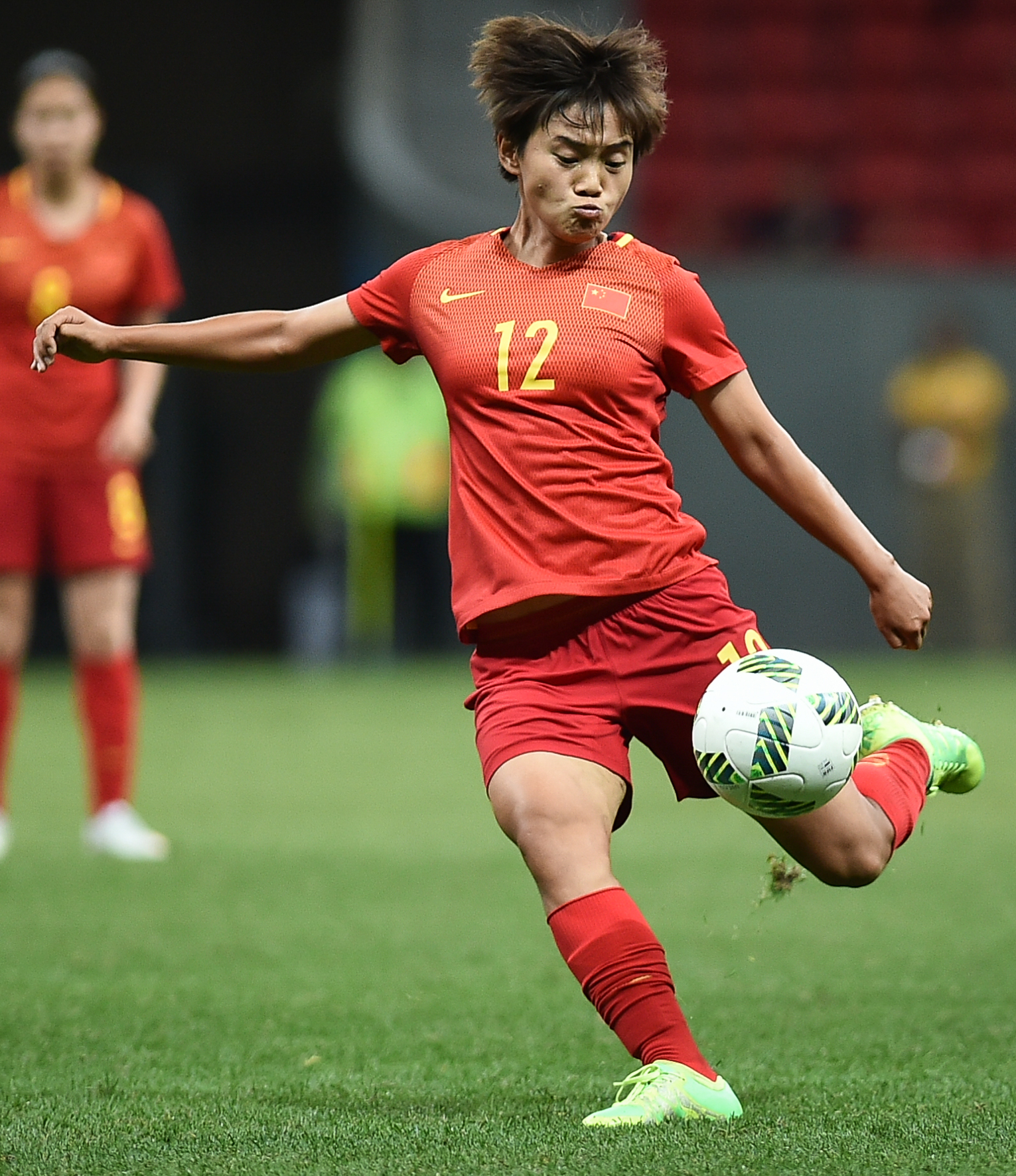 Estádio Nacional de Brasília Mané Garrincha, Brasília, DF, Brasil, 9/8/2016. China e Suécia jogam nesta terça-feira (9), no Estádio Mané Garrincha, pelo grupo E do futebol feminino na Olimpíada 2016.